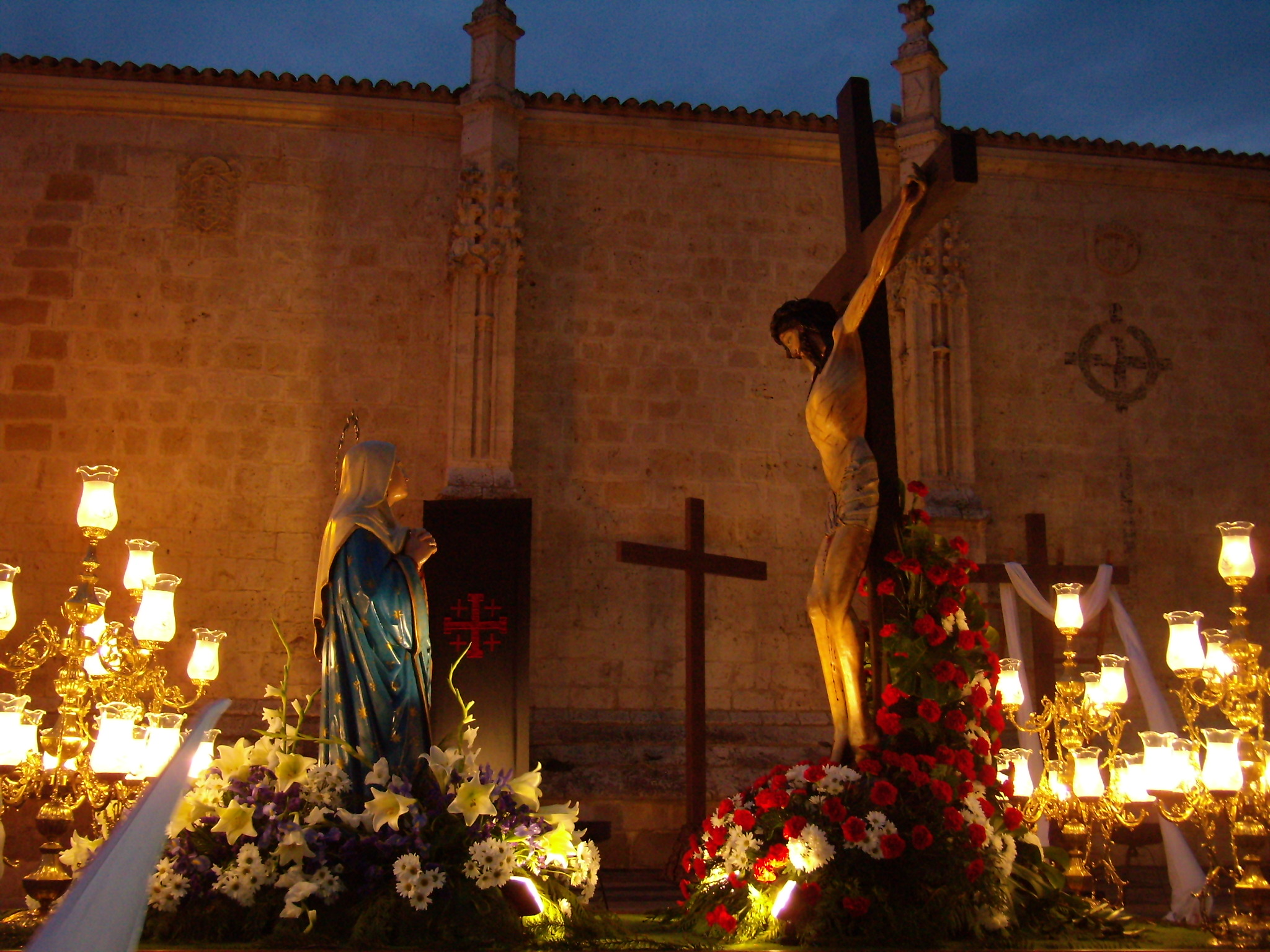 Nuestro Padre Jesús Crucificado y Ntra. Madre Dolorosa, de Alejo de Vahia, siglo XIV. Semana Santa de Palencia.